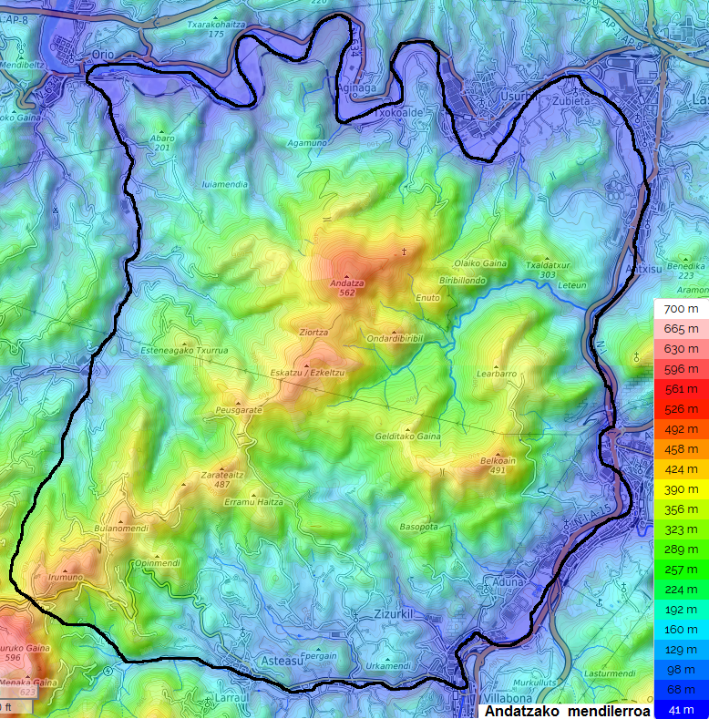 Andatzako mendilerroaren mapa topografikoa.